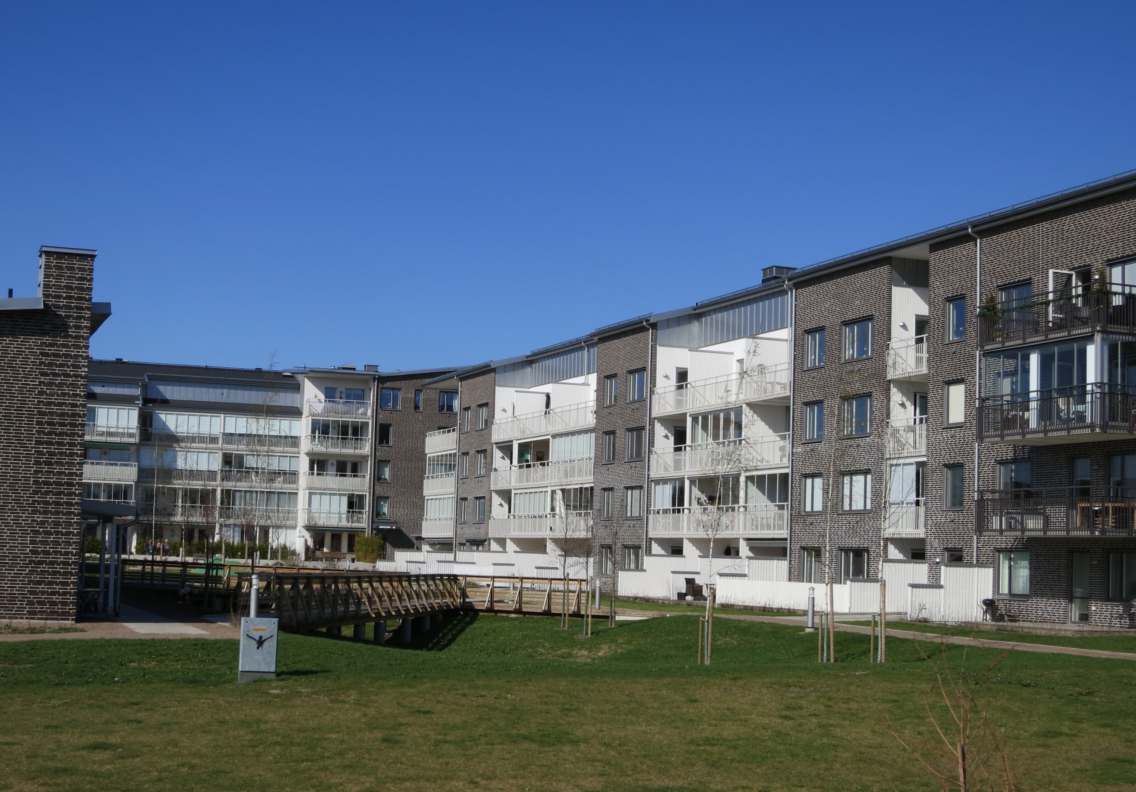 Gyllings trädgård, Malmö